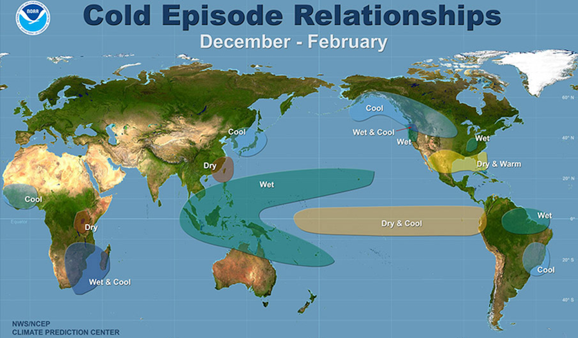 Tác động của La Niña trên thế giới